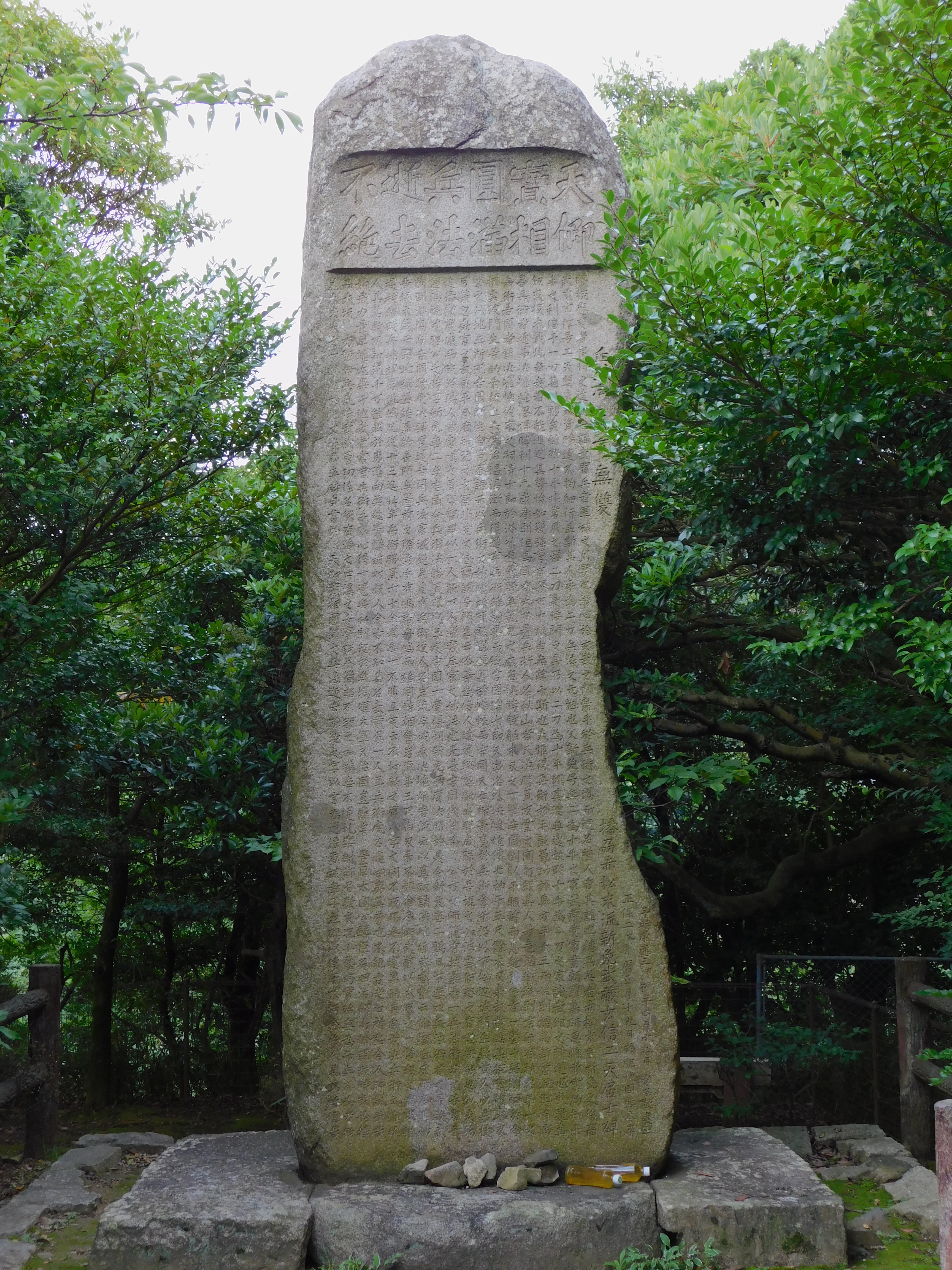 2019年7月24日撮影